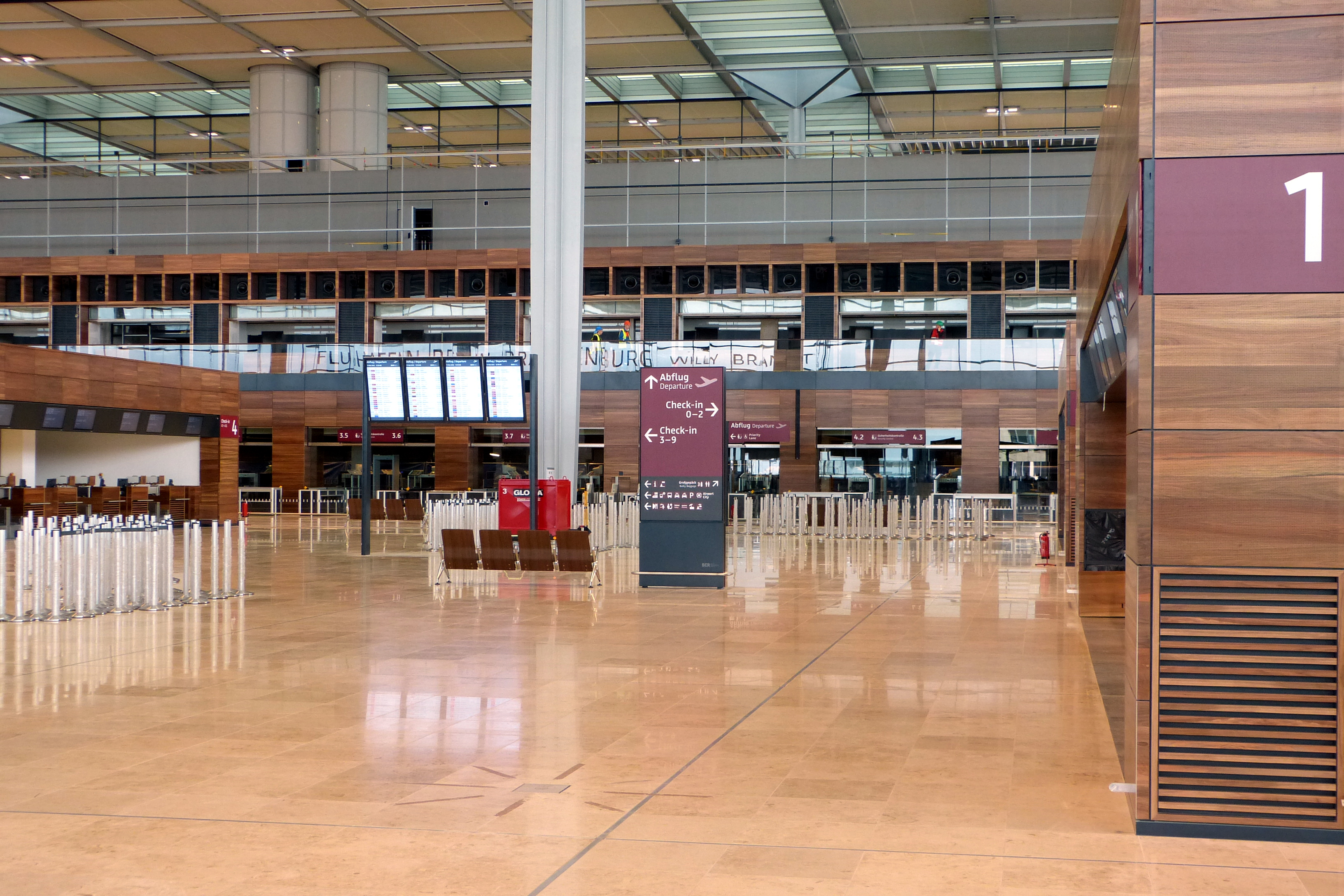 Flughafen Berlin-Brandenburg, Blick in die Abflughalle